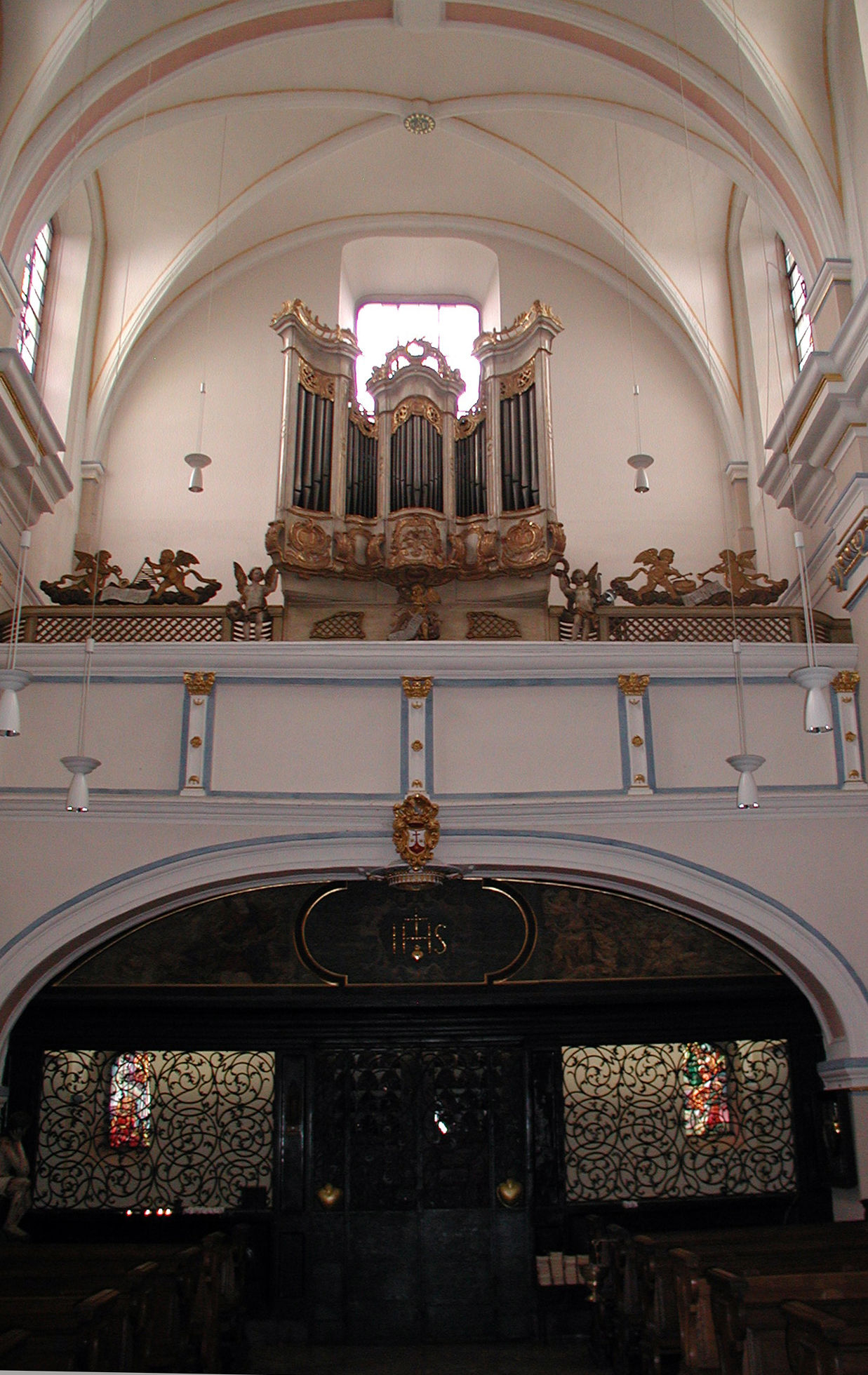 St. Maria vom Frieden, Köln